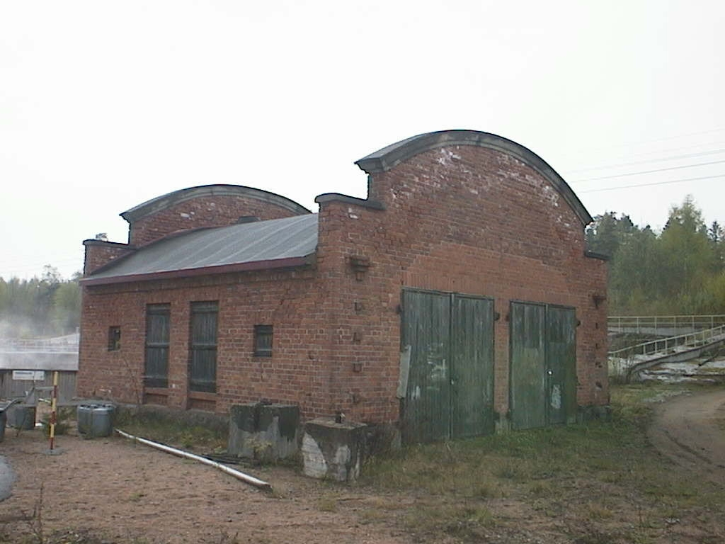 Voikkaan tehtaiden vuonna 1923 valmistunut kapearaidetalli; tässä tallissa majaili viimeksi epäsuhtainen pari eli mahtava höyrysäiliöveturi KVR7 ja heikko moottoriveturi KVR12.